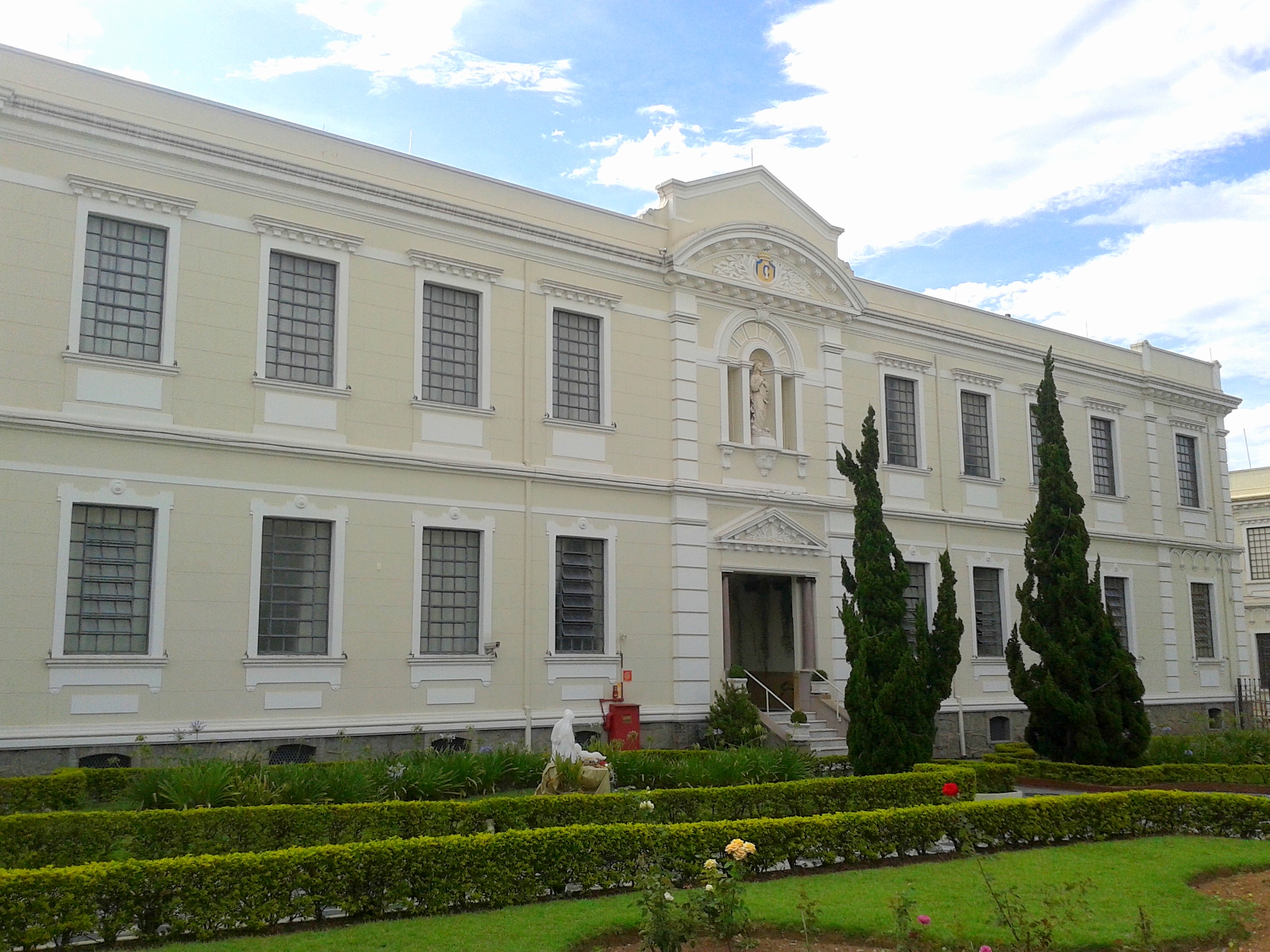 Educandário Sagrada Família. Bairro do Ipiranga, São Paulo, SP, Brasil.